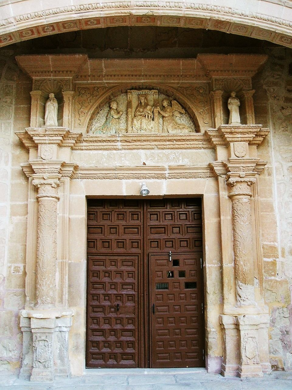 Portada de la iglesia del Monasterio de Nuestra Señora de los Huertos (MM Clarisas), Sigüenza, Guadalajara, Castilla-La Mancha, España